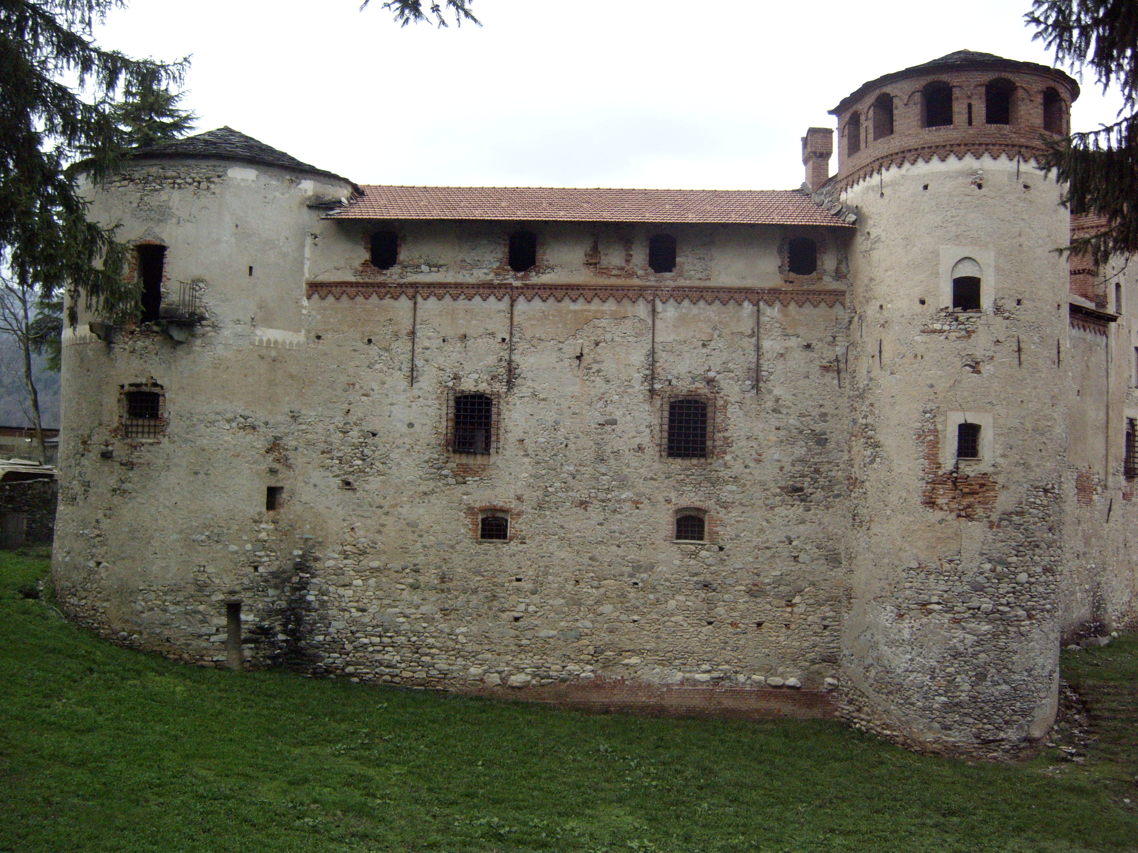 Castello di Cartignano